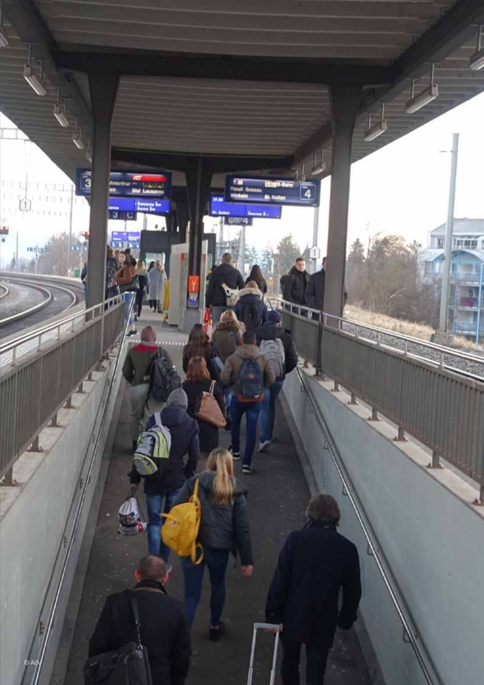 Perron im Bahnhof Uzwil